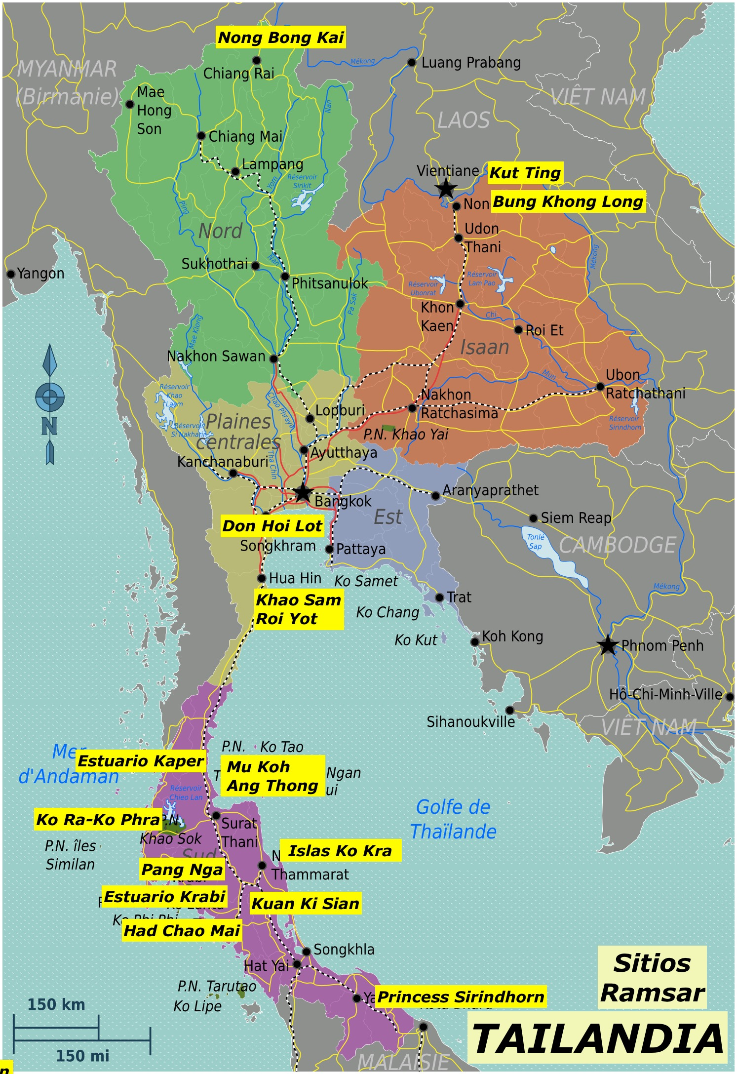 Mapa sitios Ramsar de Tailandia a partir de mapa wiki Thailand regions map (fr).png